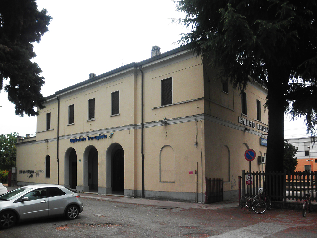 Stazione ferroviaria di Ospitaletto-Travagliato.